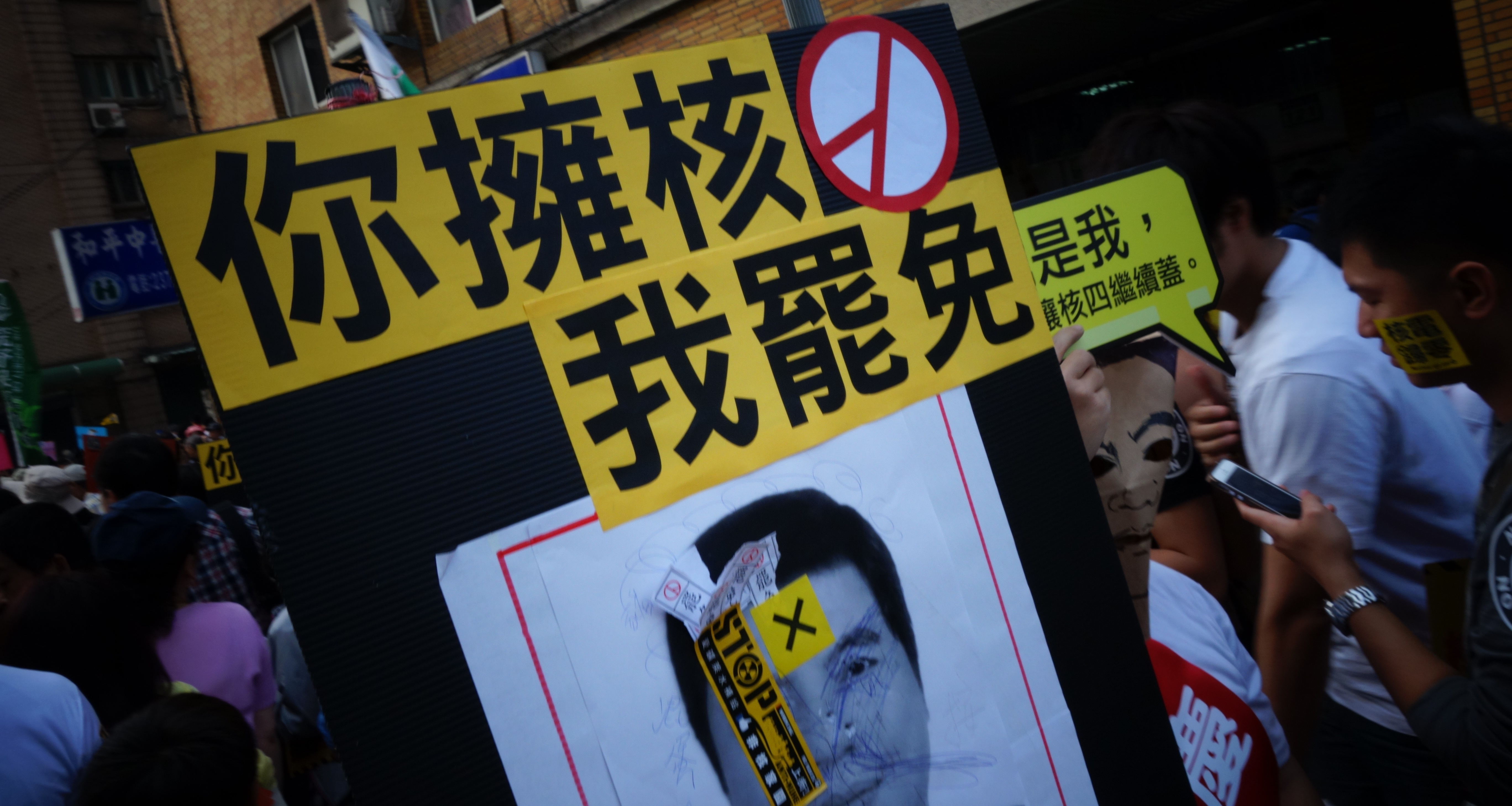 2013.3.9反核行動劇諷刺抨擊新北市中國國民黨立委張慶忠